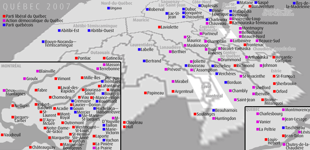 Carte indiquant les résultats par siège et par région des élections générales québécoises, 26 mars 2007. Infographie par Montréalais. Map displaying results by seat and region in the Quebec general election, 26 March 2007. Graphics by Montréalais.